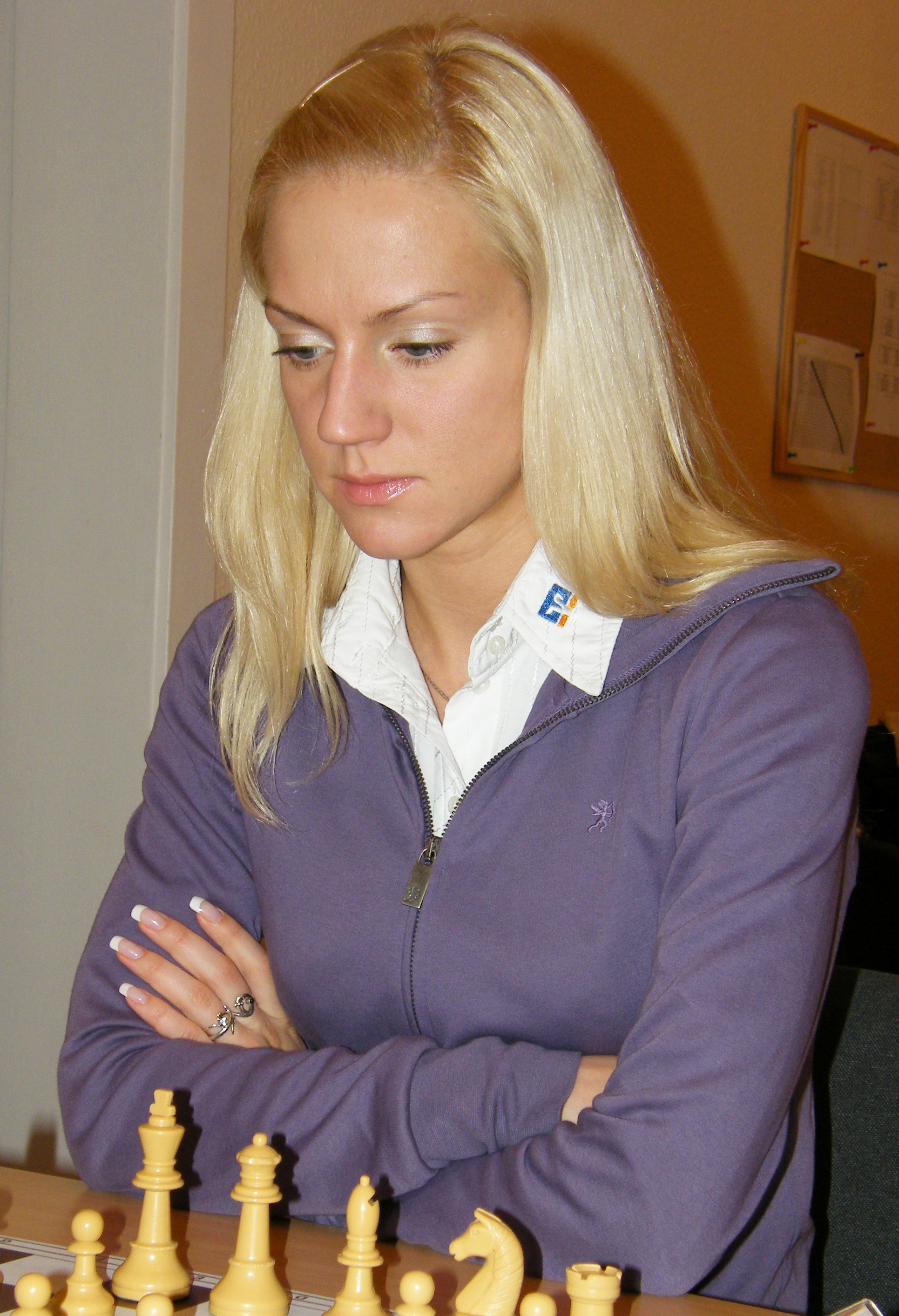 Anna Scharewitsch bei der 8. Runde der Frauen-Bundesliga in Berlin